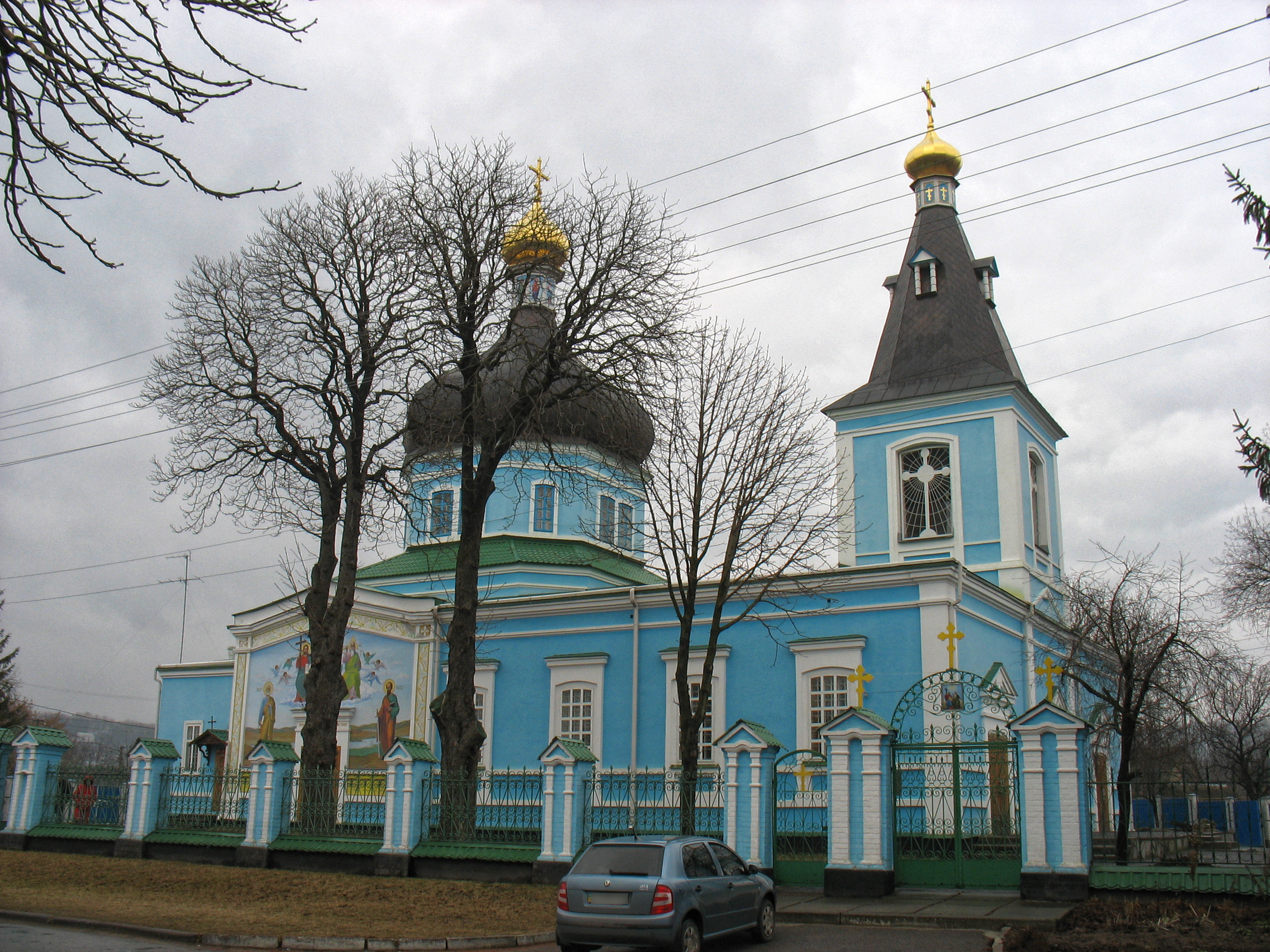 Ржищів, Троїцька церква